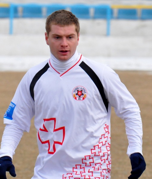 Владимир Лысенко — украинский футболист.